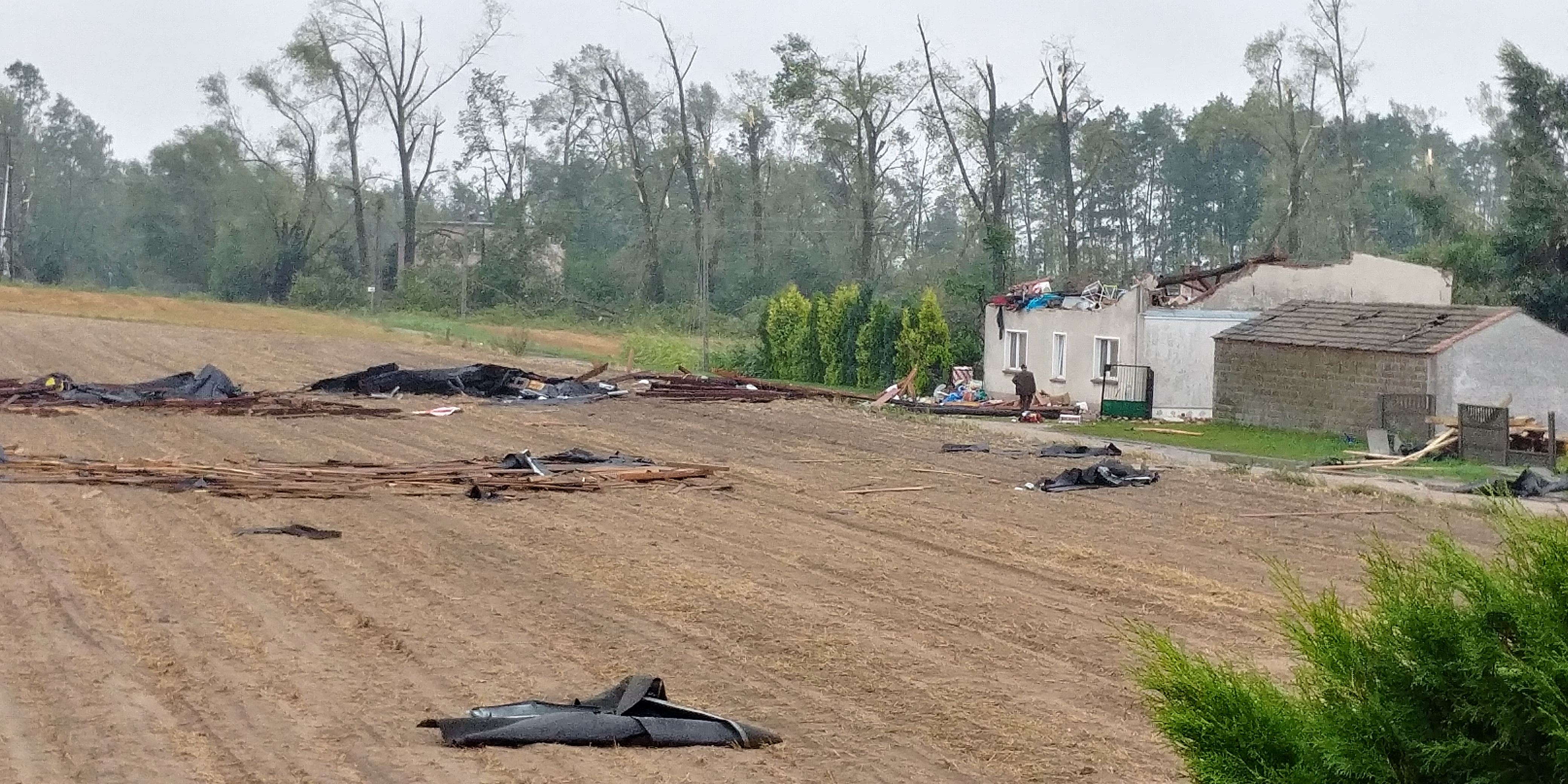 Jeden z zniszczonych po nawałnicach budynków mieszkalnych w miejscowości Huta (gmina Koronowo)